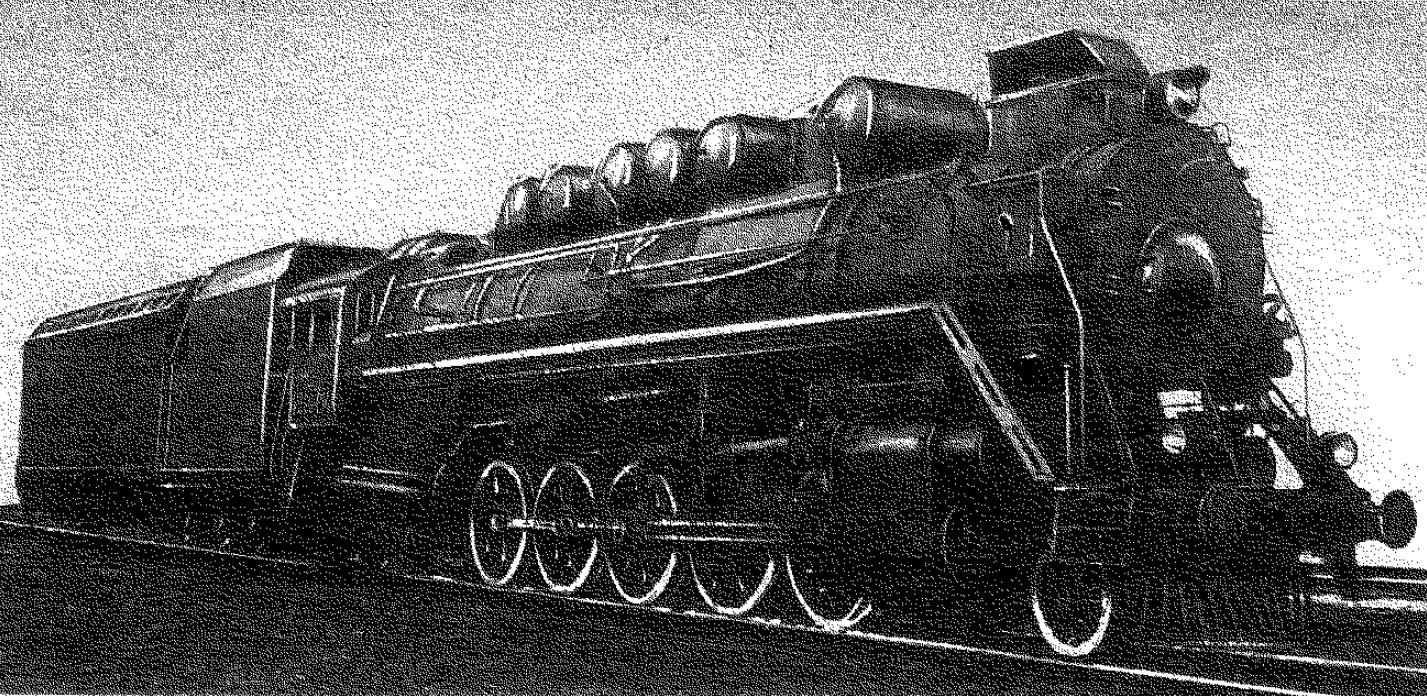 Паровоз ФДк с конденсацией пара